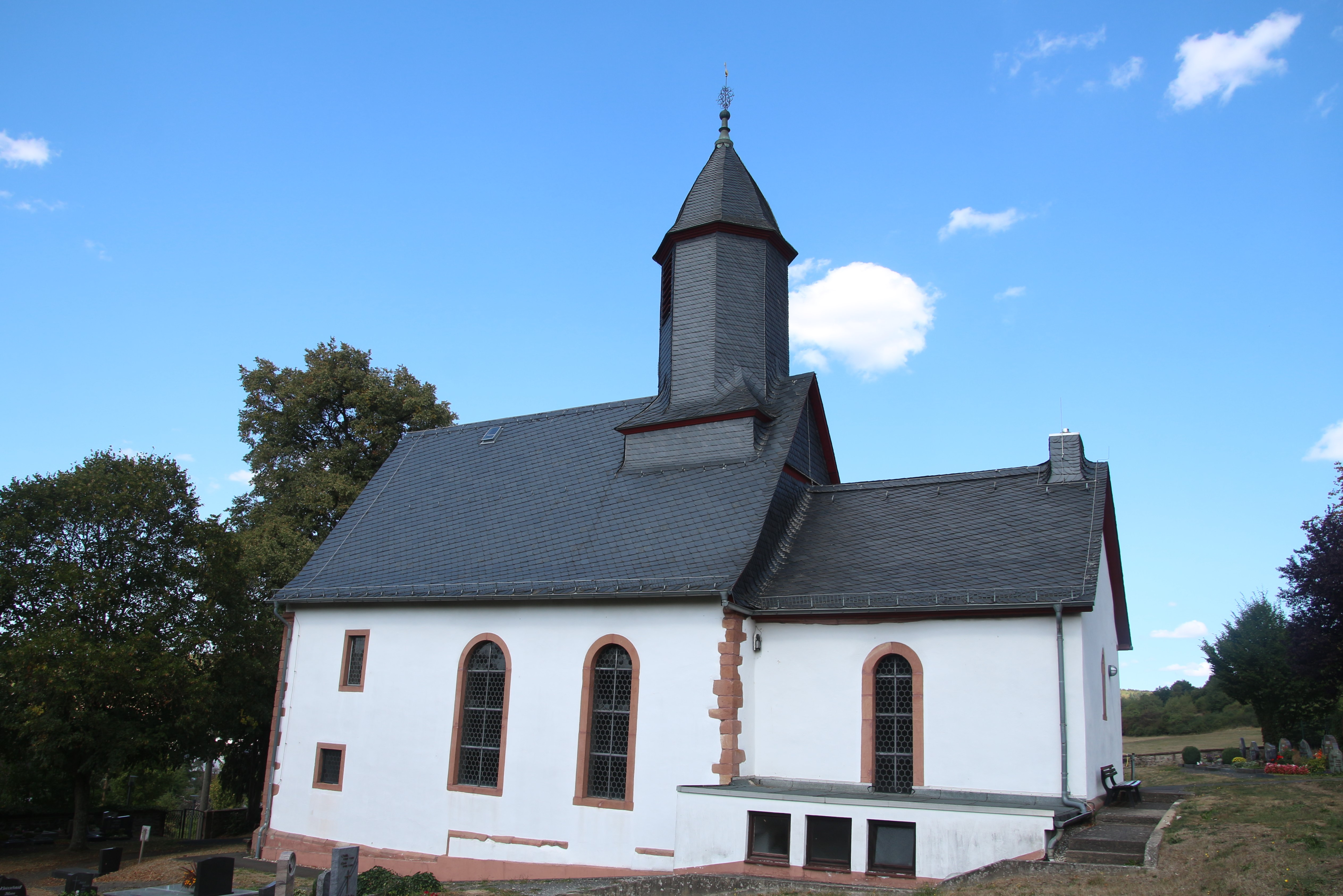 Evangelische Kirche Eichelsdorf, Gemeinde Nidda, Wetteraukreis, Hessen